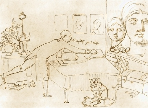 Das verfluchte zweite Kissen, Brown pen-and-ink on grey tinted paper, 19.7 × 26.9cm. Weimar, Stiftung Weimarer Klassik